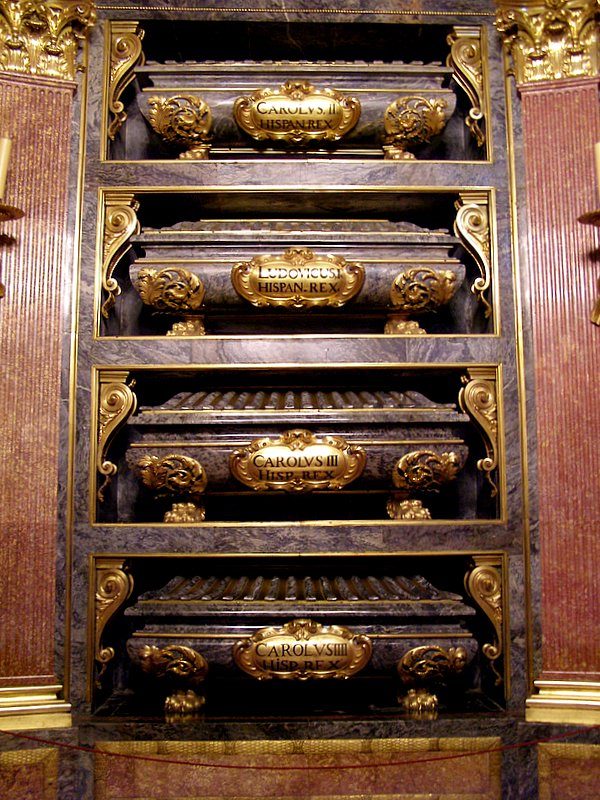 Sepulcros en el Panteón de reyes del Monasterio de San Lorenzo de El Escorial: De arriba a abajo, contienen los restos de los siguientes monarcas: Carlos II de España (1661-1700), hijo de Felipe IV de España y de Mariana de Austria. Luis I de España (1707-1724), hijo de Felipe V de España y de María Luisa Gabriela de Saboya. Carlos III de España (-1788), hermanastro del anterior e hijo de Felipe V y de Isabel de Farnesio. Carlos IV de España (1748-1819), hijo del anterior.